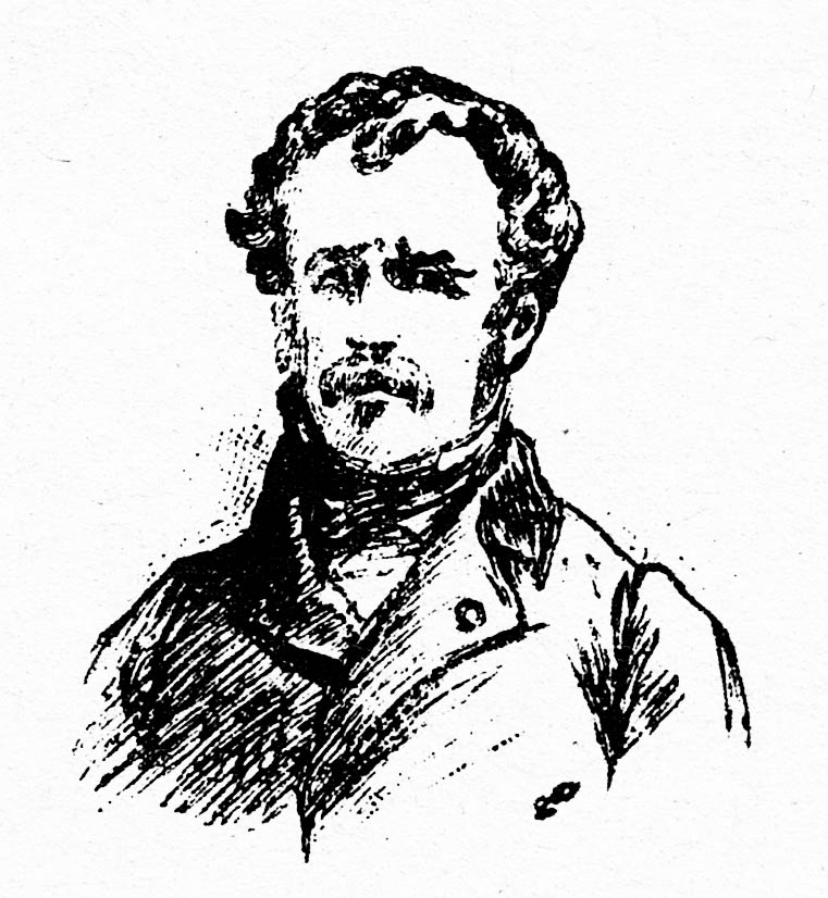 Peytier, par Charles Jouas. Vignette de couverture, tome VII de "Cent Ans aux Pyrénées", de Henri Beraldi.